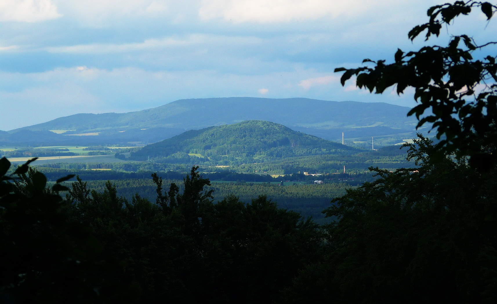 Lipka a Velký Vápenný z Dubu